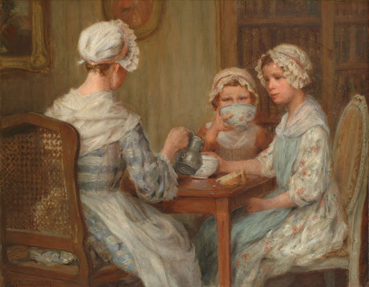 Peinture à l'huile de Jean de FRANCQUEVILLE